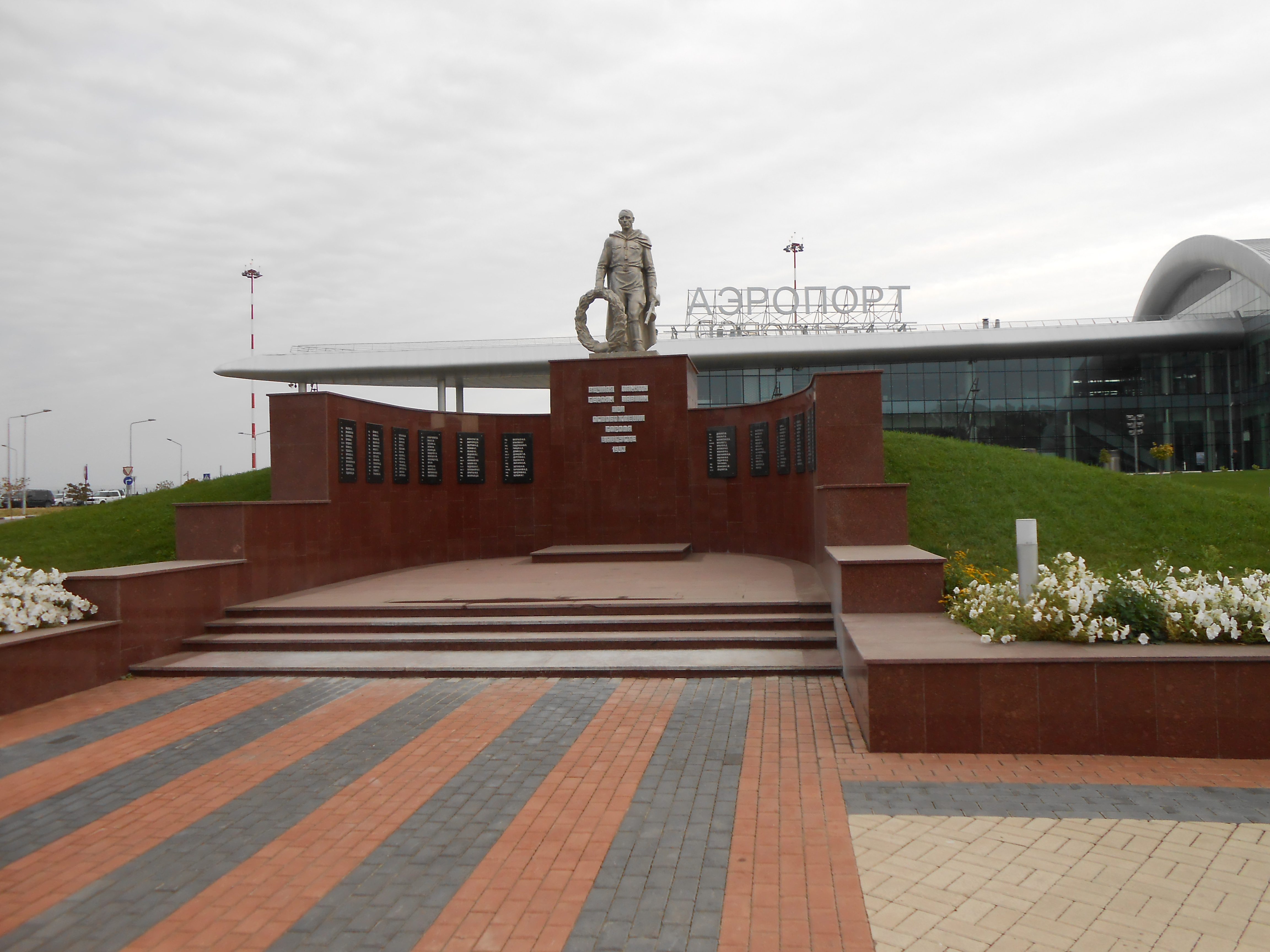 Братская могила 76 советских воинов, погибших в боях с фашистскими захватчиками: у аэропорта, 656 км автомагистрали Москва-Симферополь, Белгород, Белгородская область